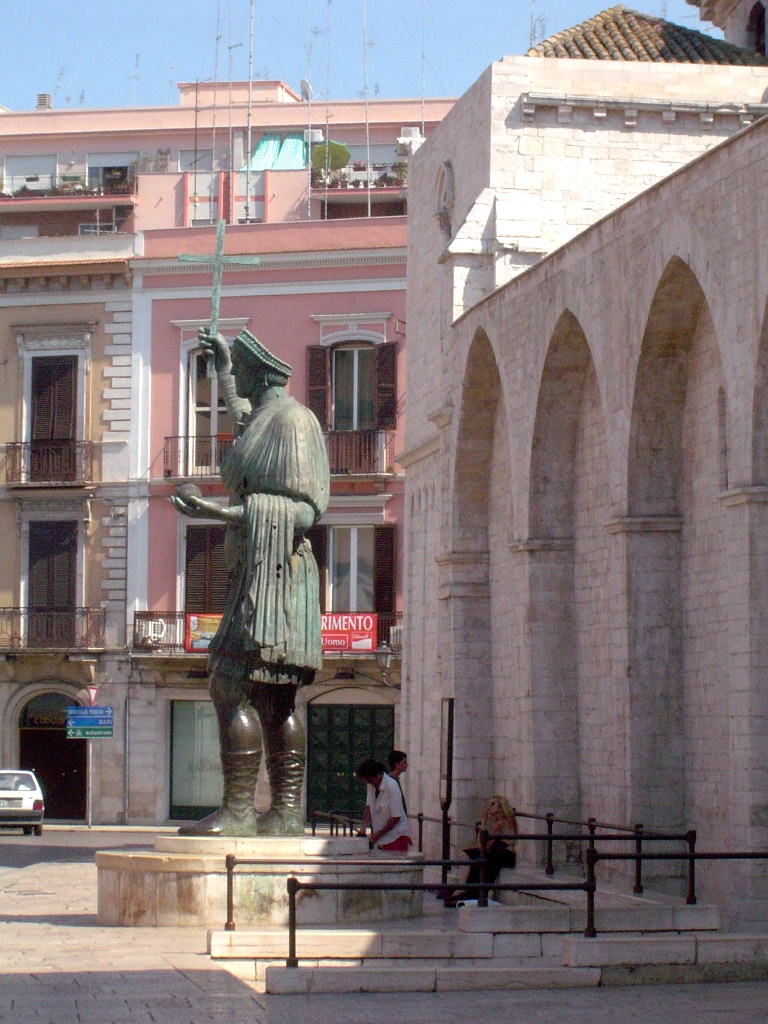 Colosso di Barletta